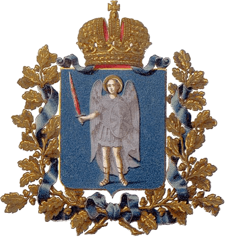 Official Russian Empire coat of arms Kiev Governorate. Герб Российской Империи Киевской губернии в Гербовнике Министерства внутренних дел Российской Империи. Утверждён Императором Всероссийским Александром Вторым.